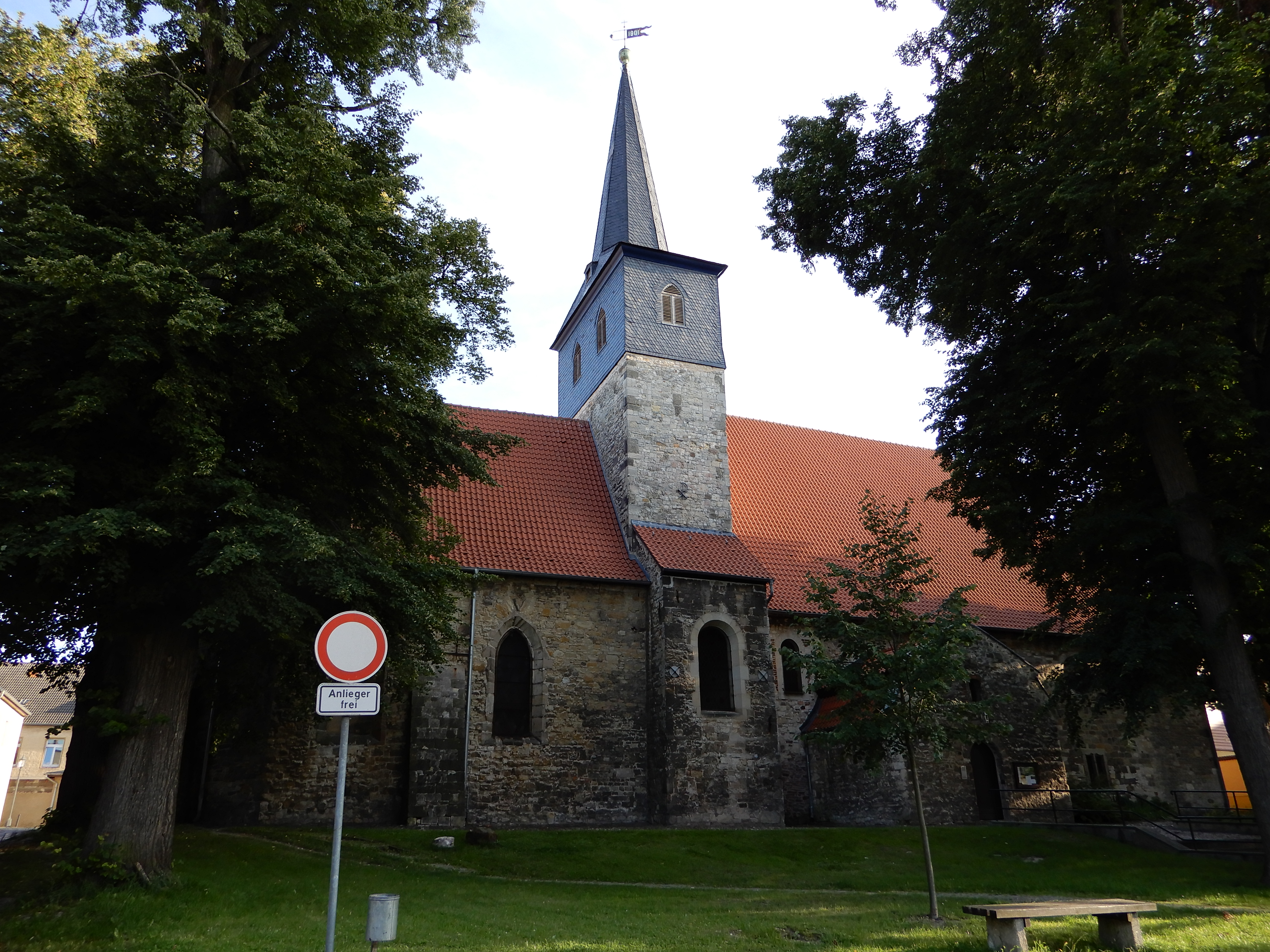 Kirche St. Sixtus in Ermsleben